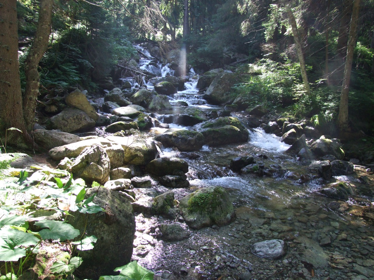 Niewcyrski Potok przy drodze przez Dolinę Koprową